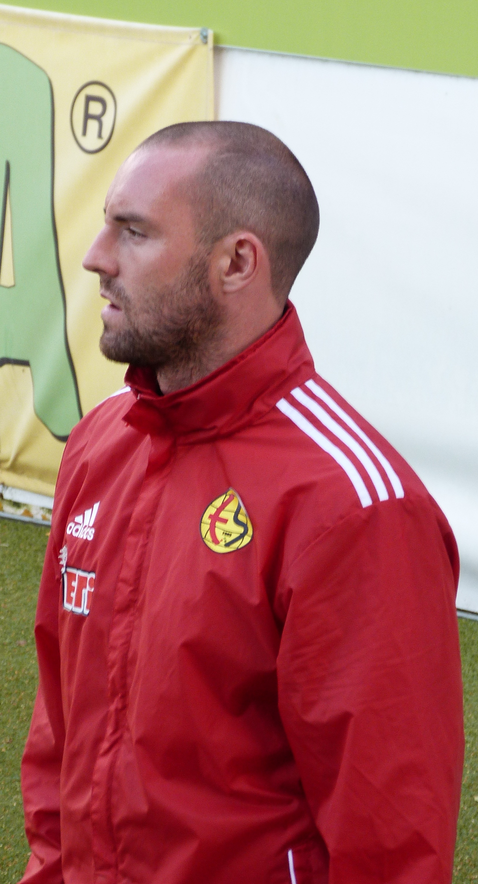 Boyd